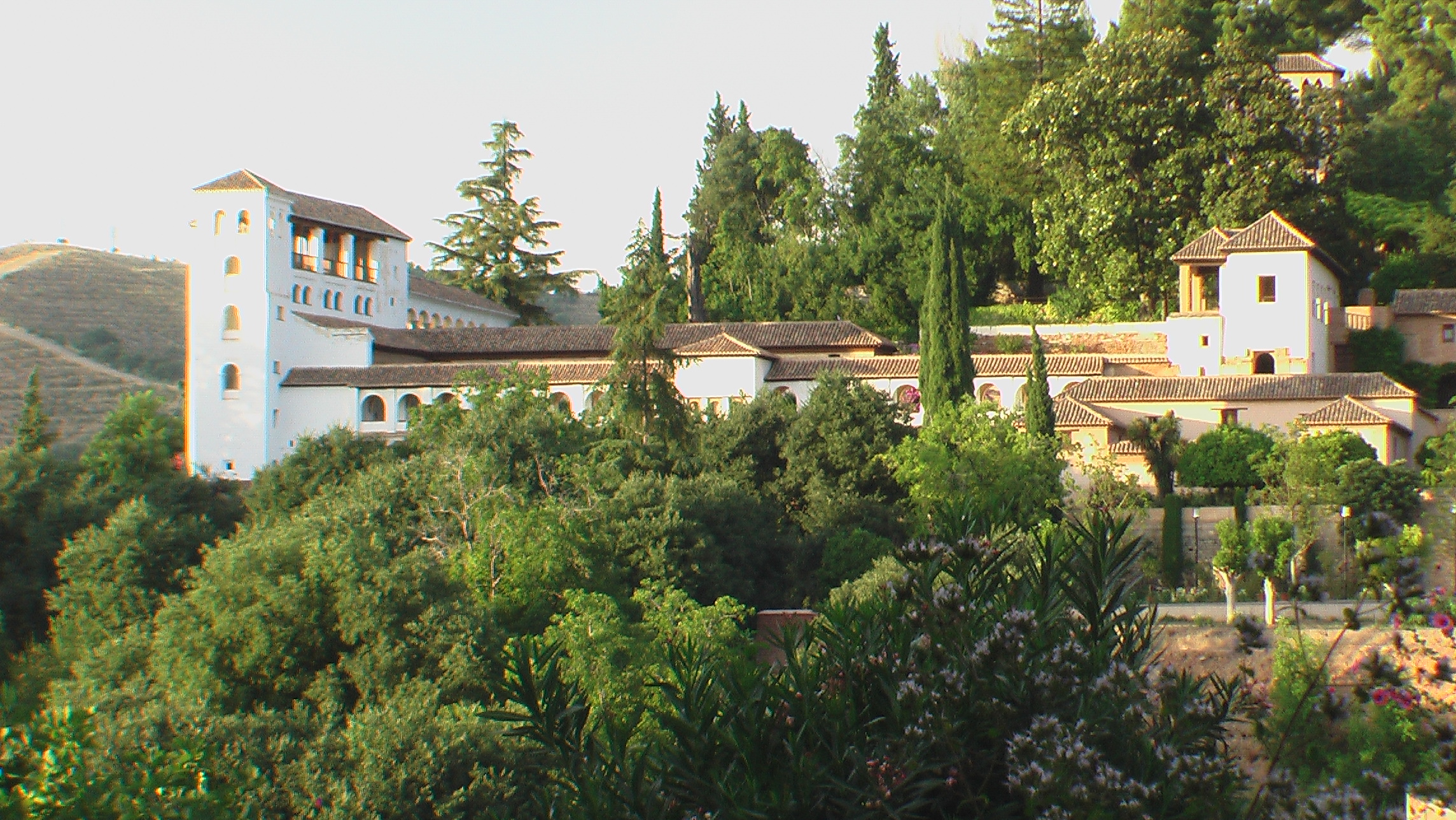 GranadaAlhambraBlickVomParador2010